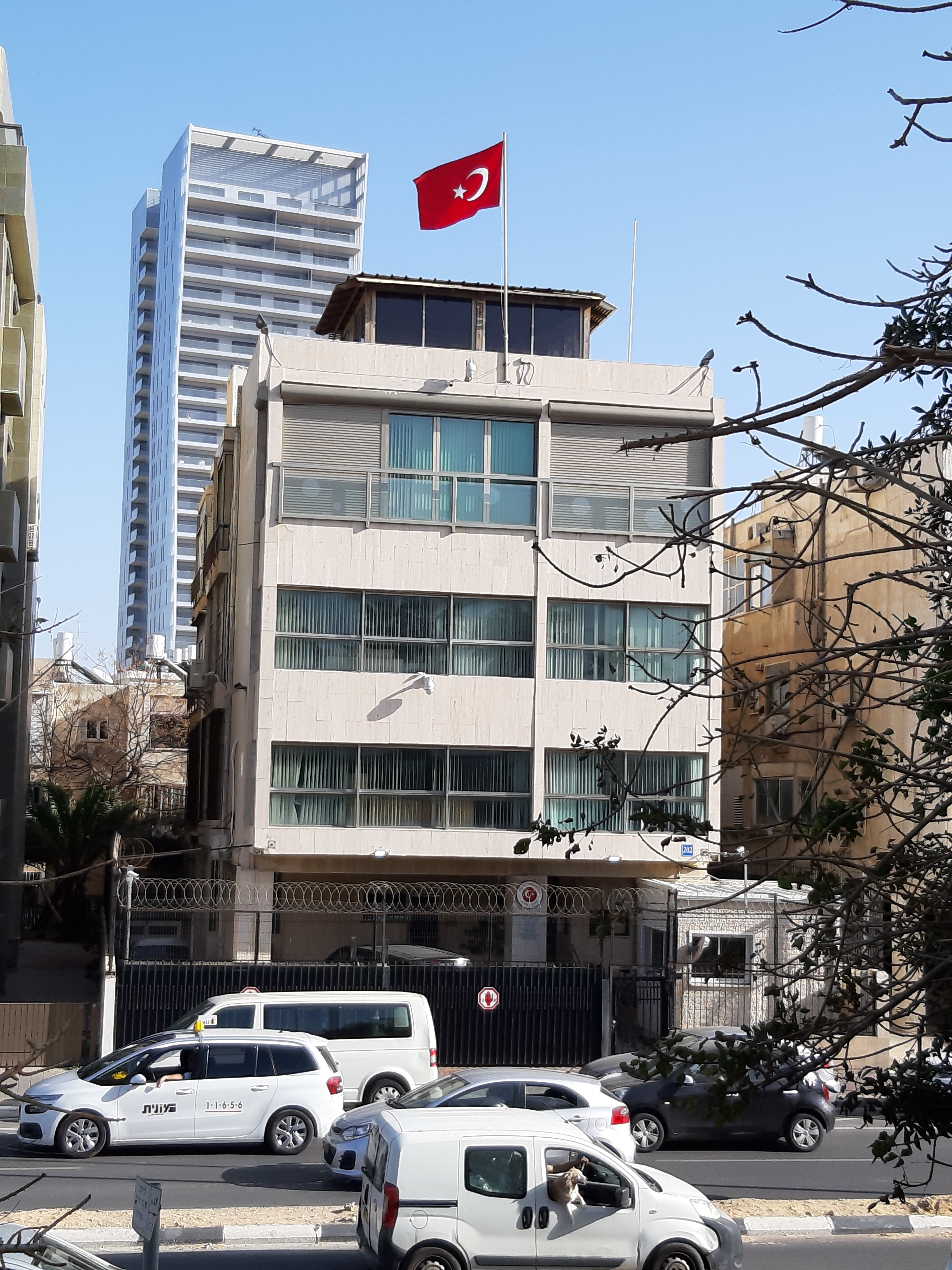 שגרירות טורקיה בישראל - רחוב הירקון 202 תל אביב